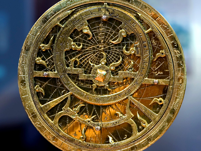 Astrolabe planisférique Mère et tympan : Turquie ottomane, 1098 H / 1686-1687 Araignée: maghreb, vers 1850 Laiton à décor gravé et incisé D. 10,2cm Paris, musée de l'Institut du monde arabe, AI 86-45 Legs Destombes